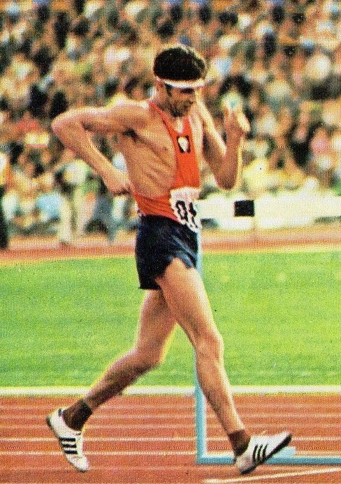 CAMPIONI dello SPORT 1973/74-Figurina n.57- SOLDATENKO-URSS-ATLETICA LEGG.